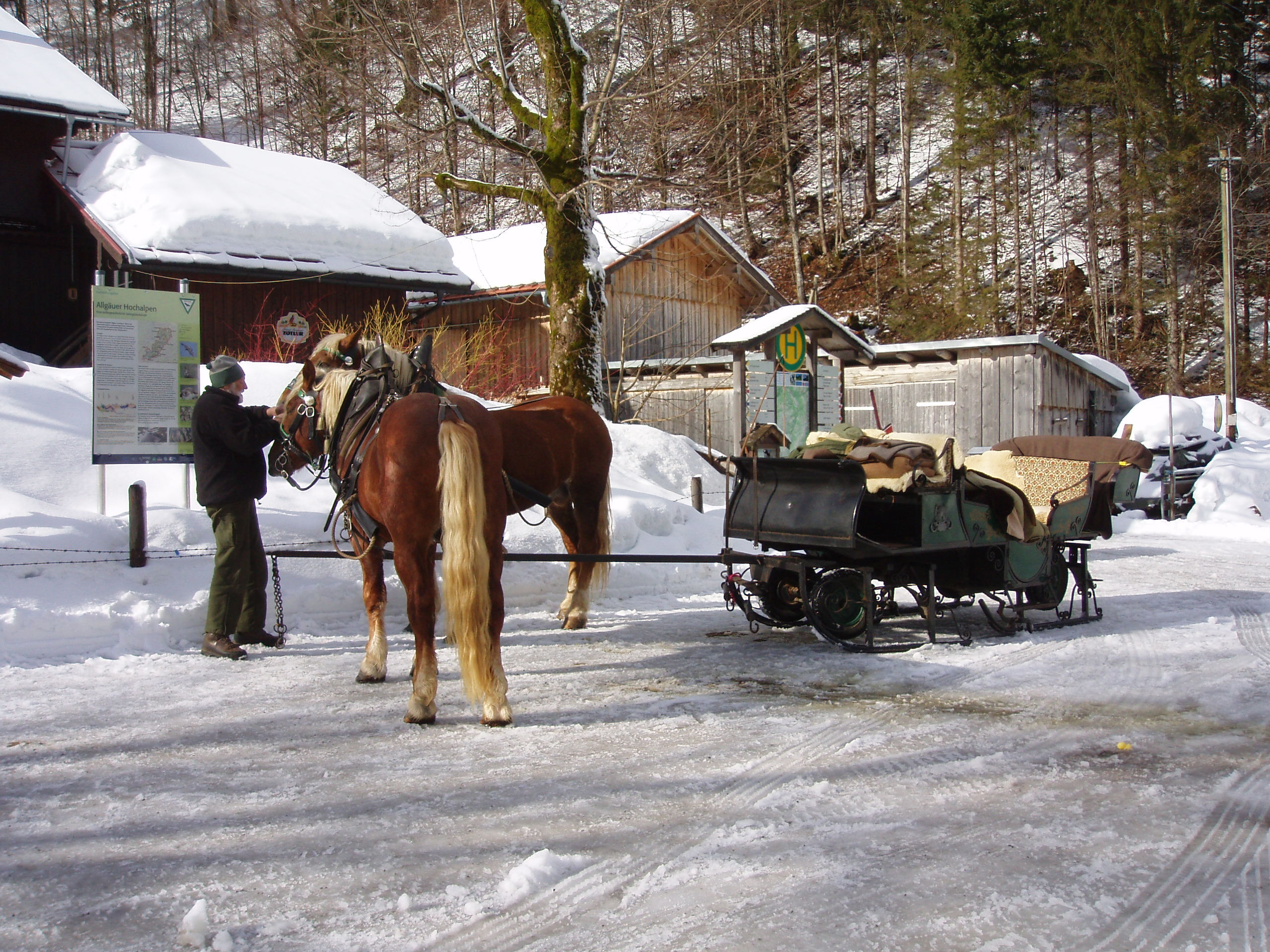 Pferdeschlitten beim Giebelhaus